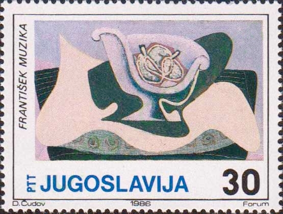 Still Life by František Muzika